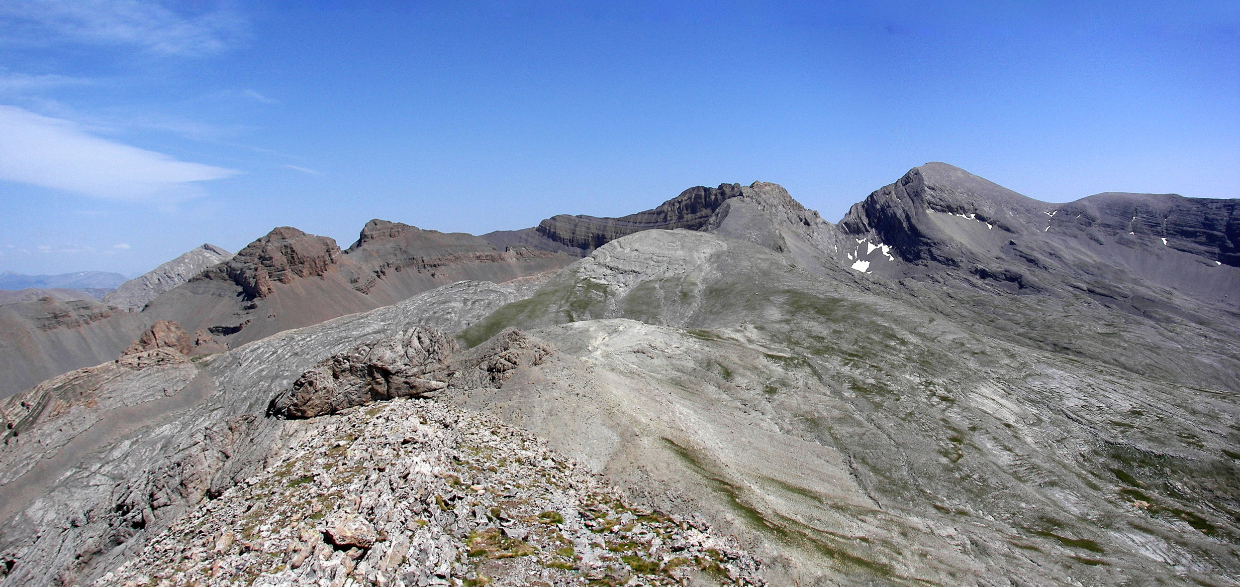 Macizo de Cotiella This is a photography of a Site of Community Importance in Spain with the ID: ES2410013. Natura2000 entry, EEA entry